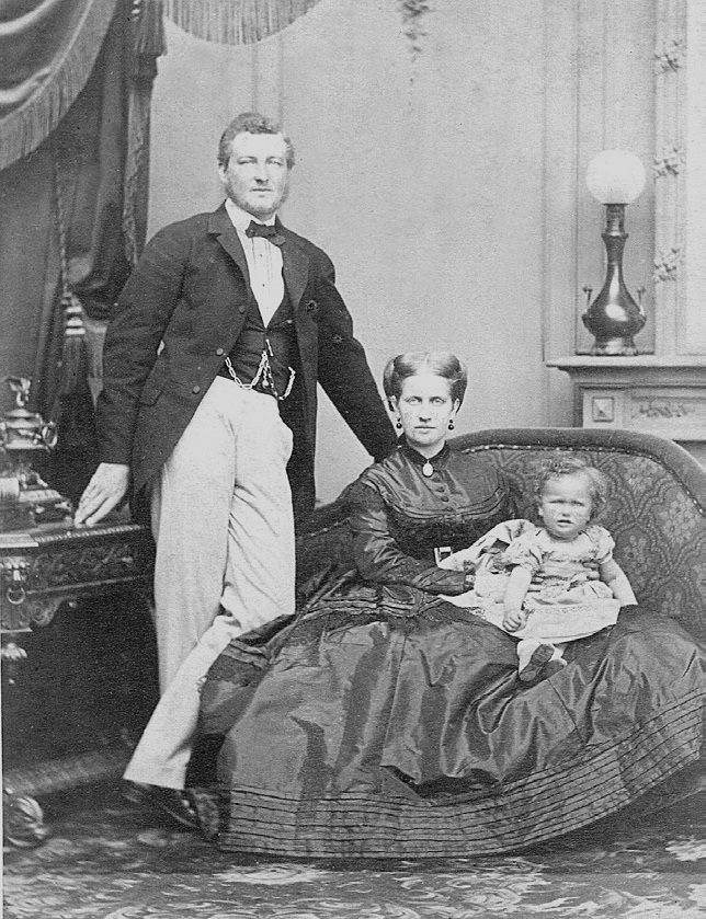 Príncipe Luís Augusto de Saxe-Coburgo-Gota e sua esposa, a Princesa Dona Leopoldina de Bragança, com seu filho mais velho, o Príncipe Dom Pedro Augusto.